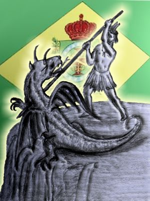 Desenho alusivo à Independência da Bahia, representando a participação do nativo brasileiro nas batalhas que levaram este estado à completa emancipação de Portugal. A "Alegoria do Caboclo" é o símbolo da luta contra o "dragão da opressão" - o colonizador. Ao fundo, a Bandeira do Império do Brasil, representando a unidade do país, que prevaleceu. desenho feito por André Koehne para a Wikipédia.